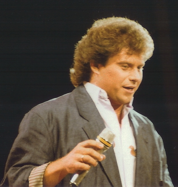 Andy Borg, german Schlager-Singer